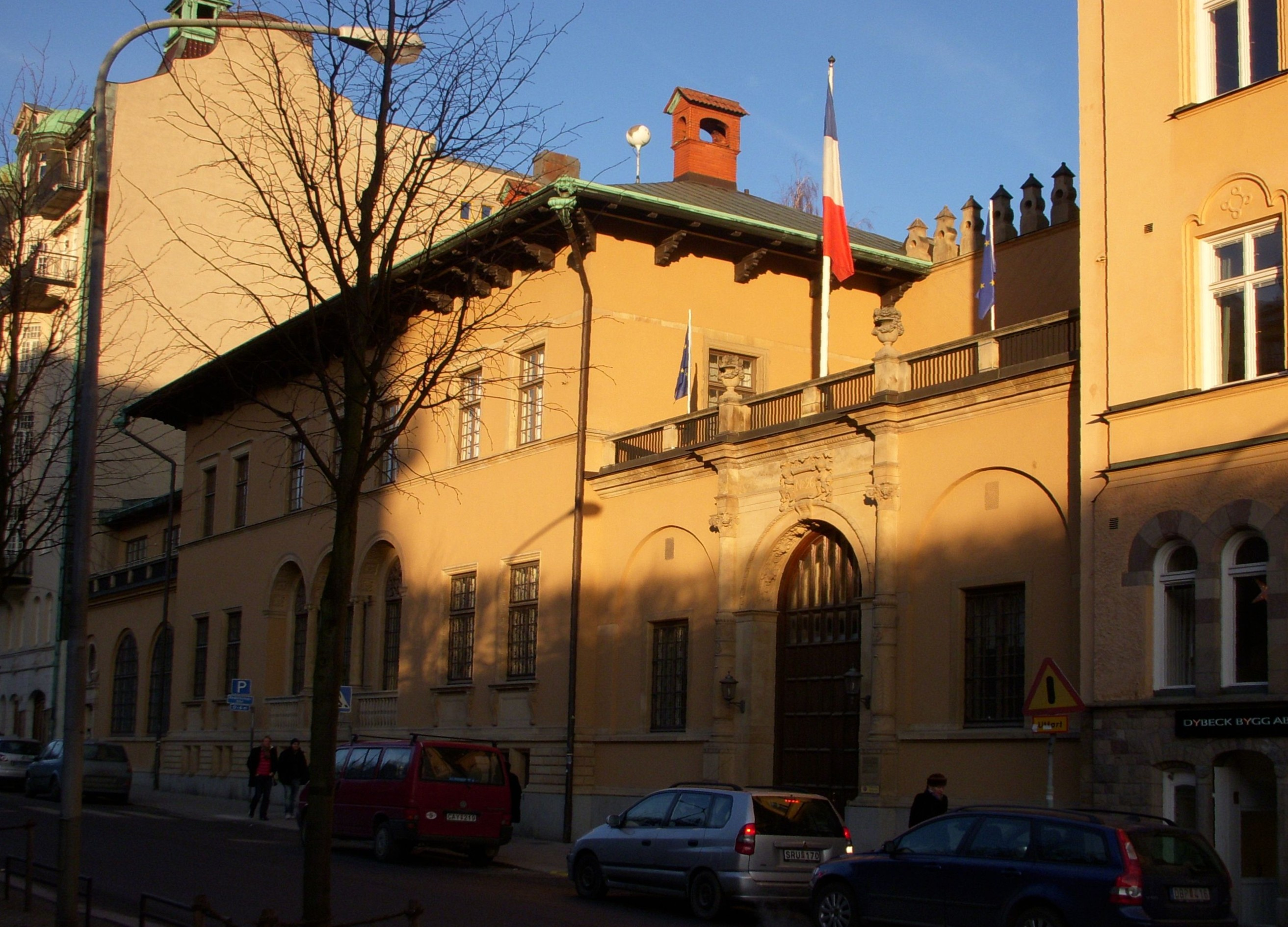 Bromska palatset Narvavägen 26 i Stockholm